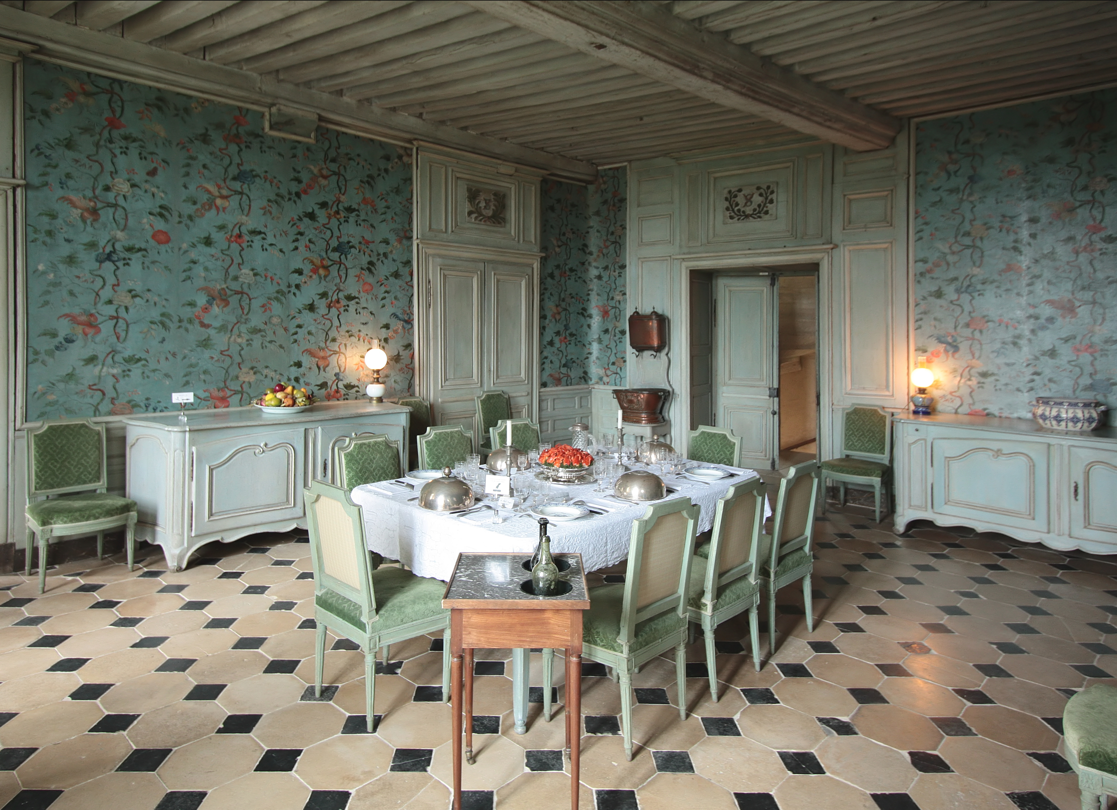 Schloss Talcy, Loir et Cher/Frankreich - Esszimmer